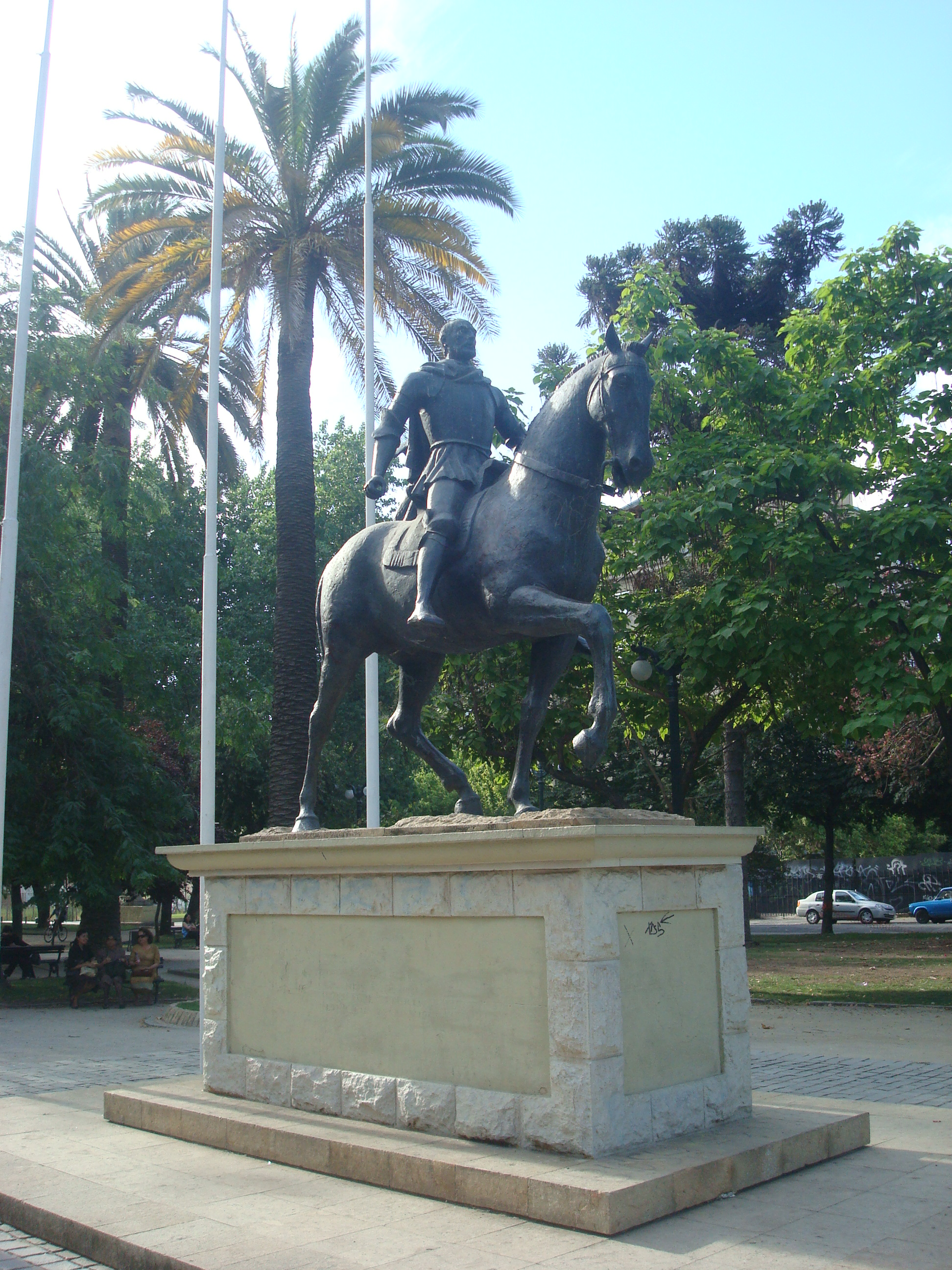 Estatua de Diego de Almagro, Parque Almagro, Santiago de Chile